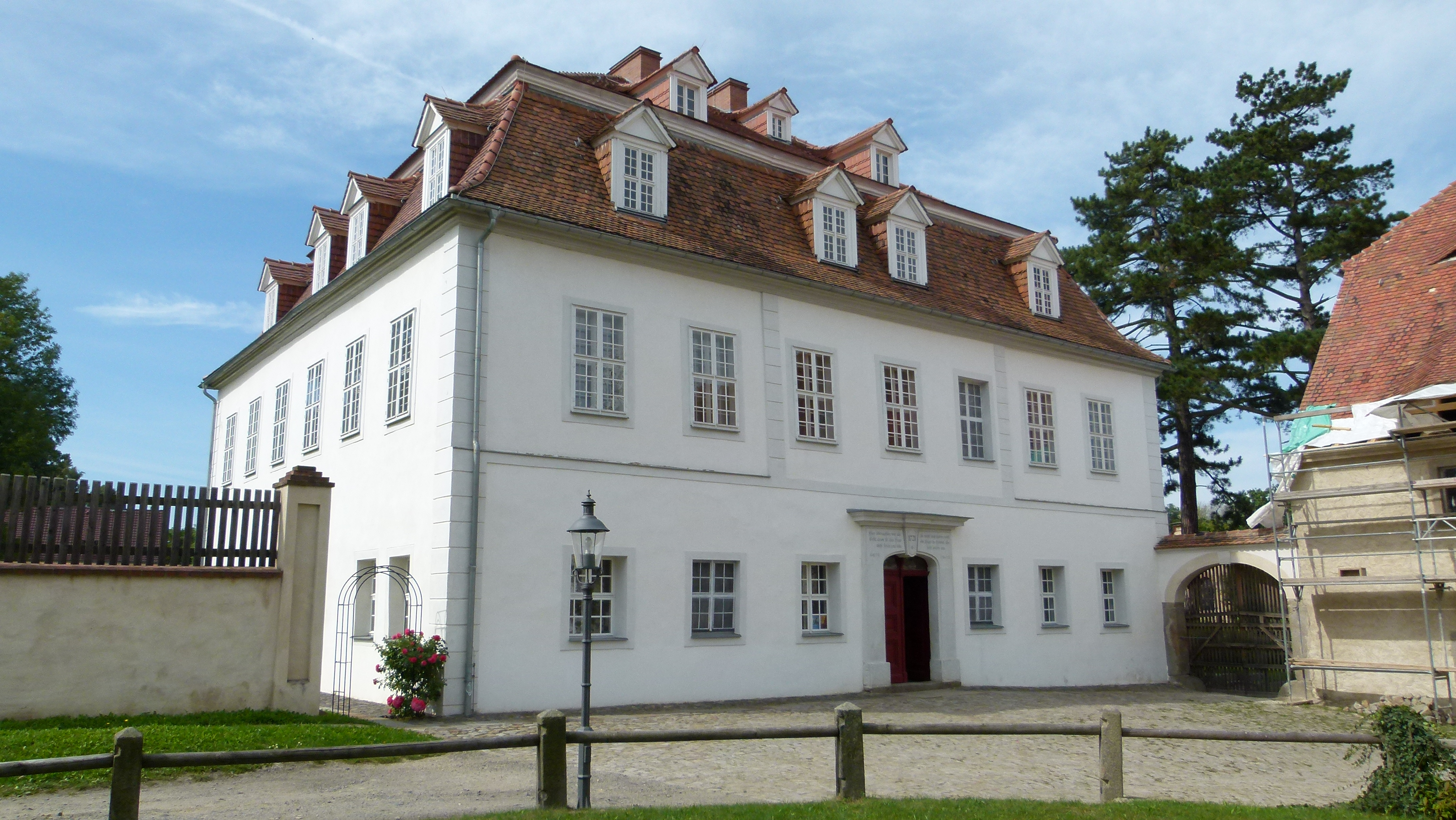 Zinzendorfschloss-Berthelsdorf, Herrnhut, Sachsen